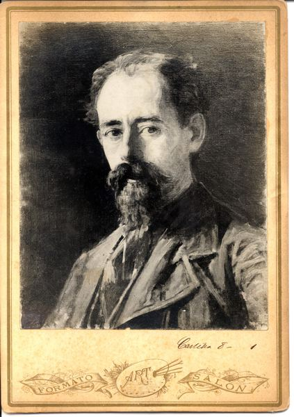 Gioacchino Toma, pittore, fotografia, Biblioteca Lucchesi Palli, Napoli